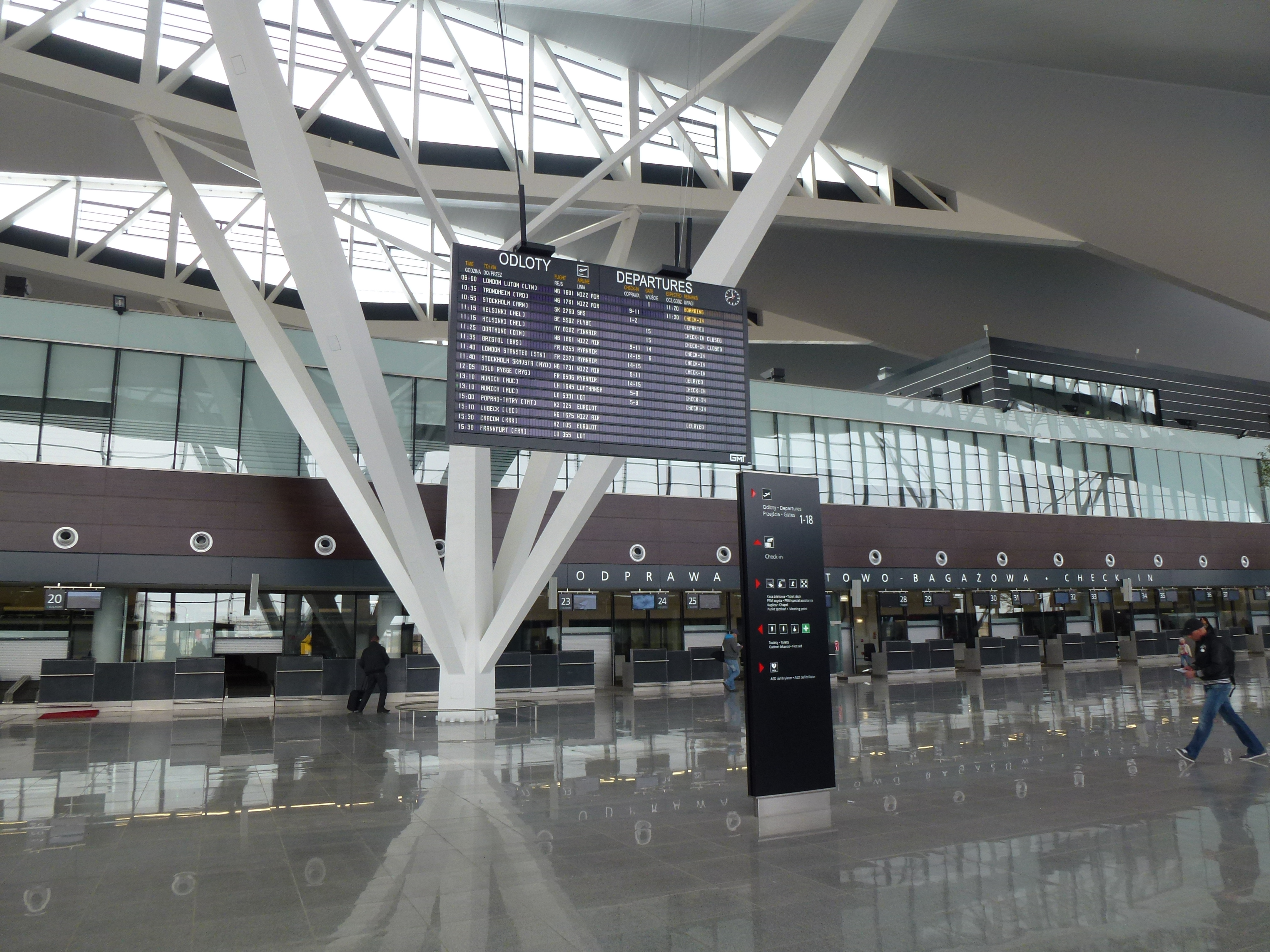 Gdańsk-Lotnisko im. Lecha Wałęsy-Terminal II